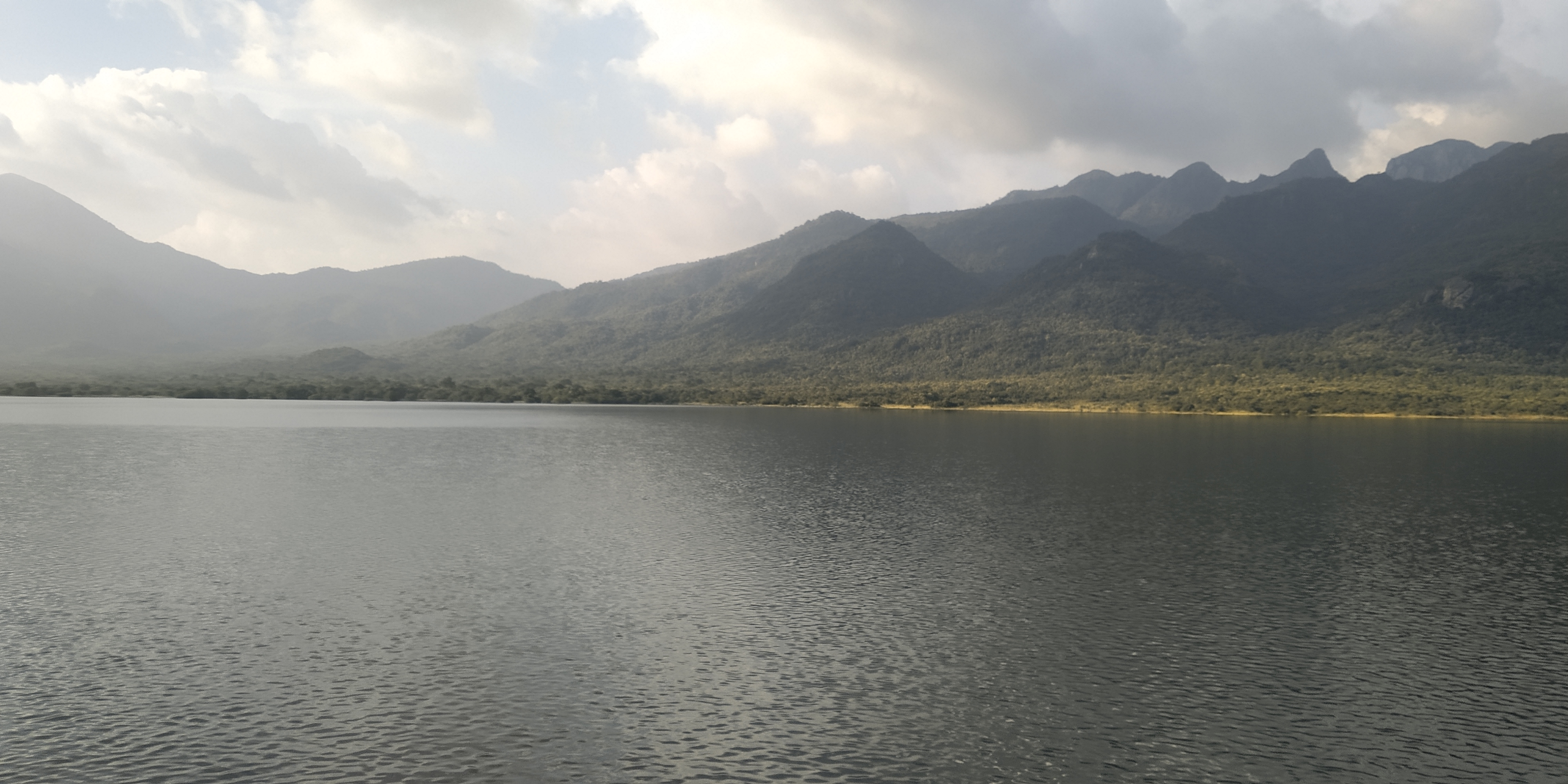 வடக்கு பச்சையாறு அணை 2019 ஆம் ஆண்டு வடகிழக்கு பருவமழையின் போது